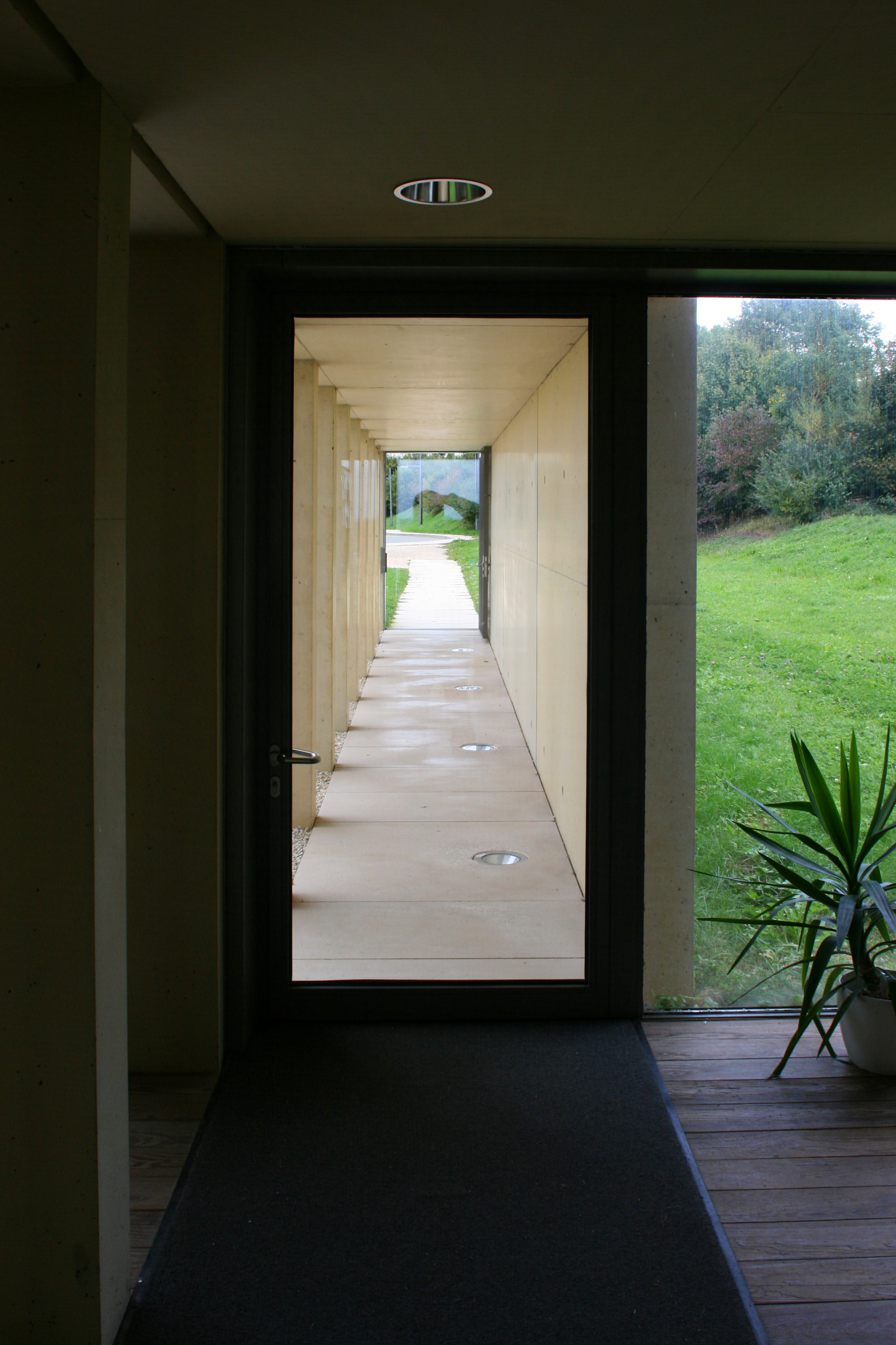 Autobahnkapelle Emmaus an der Raststätte Im Hegau West, BAB 81, Zur Engener Höhe in Engen